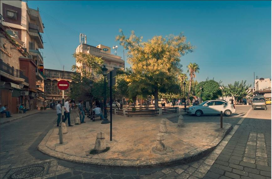 Sahat al Hatab vu 2010